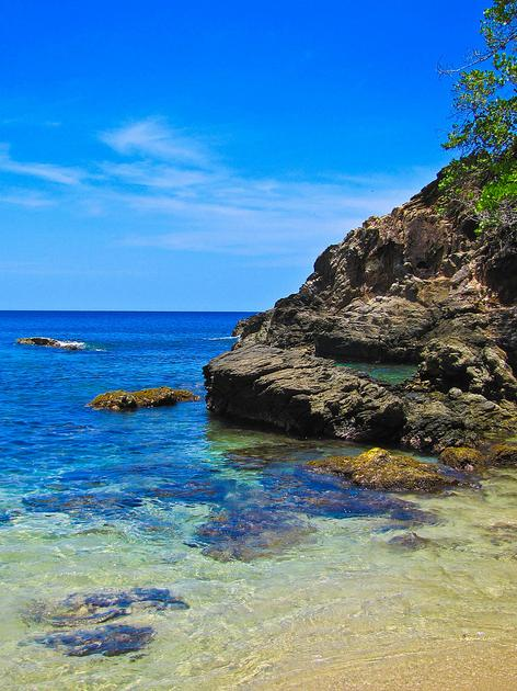 Higuerote, Estado Miranda, Venezuela